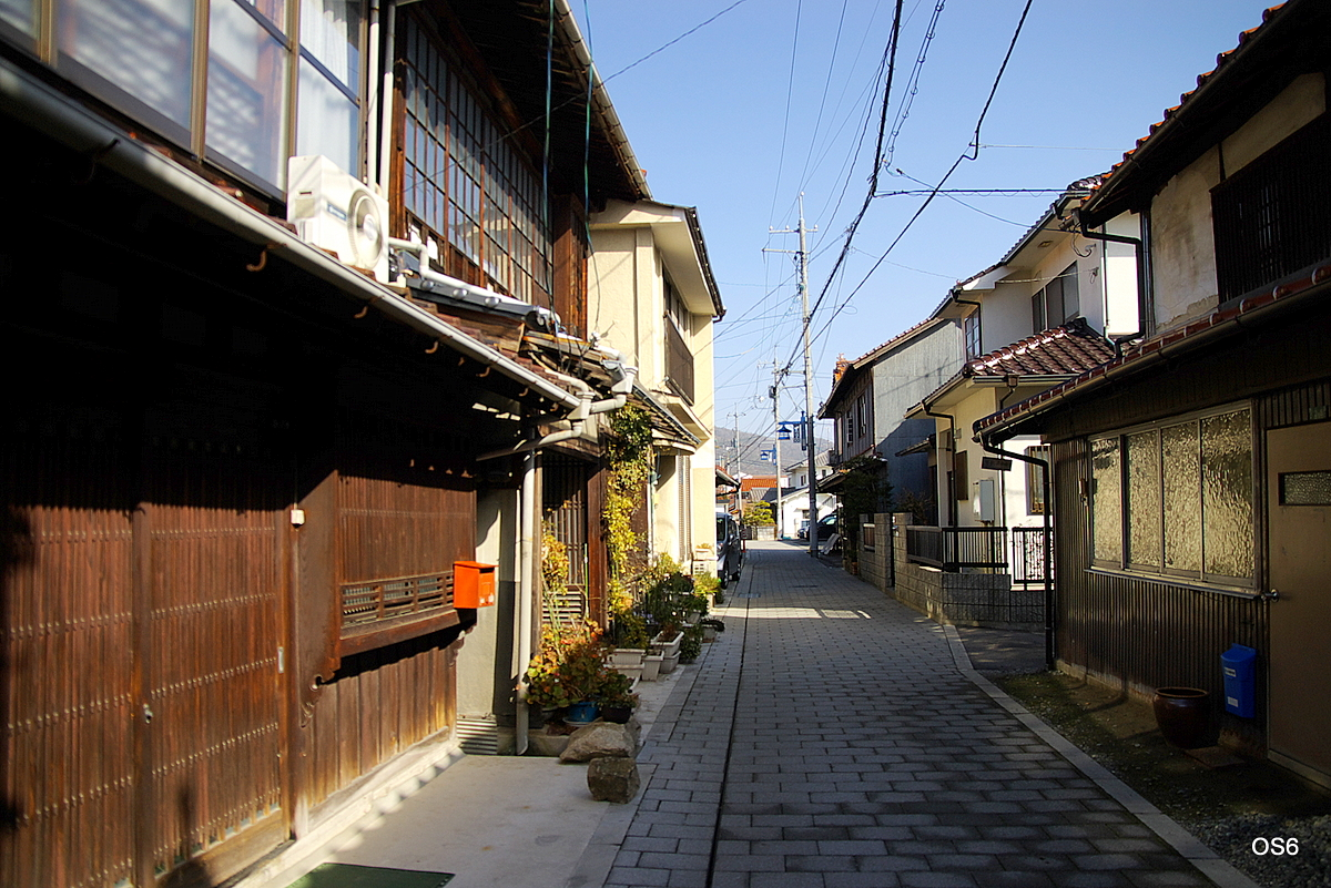 広島県東広島市西条本町